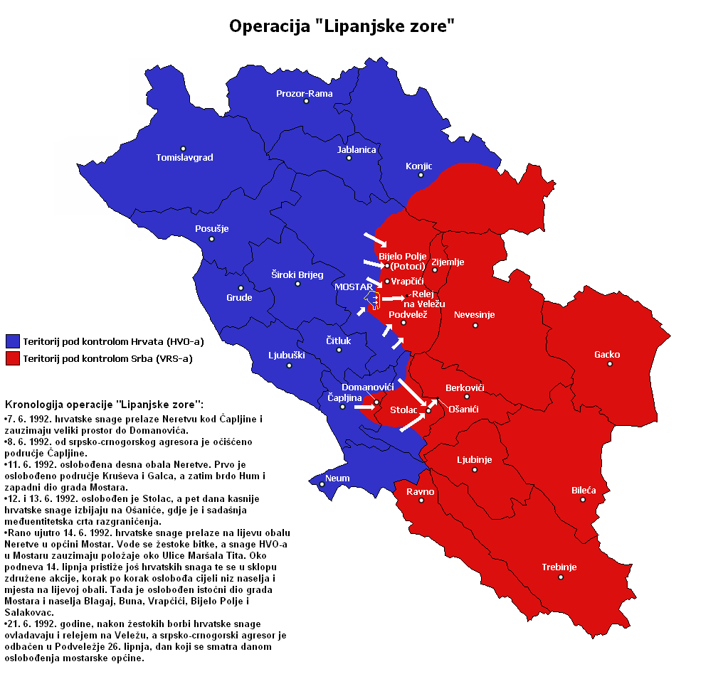 Operacija Lipanjske zore